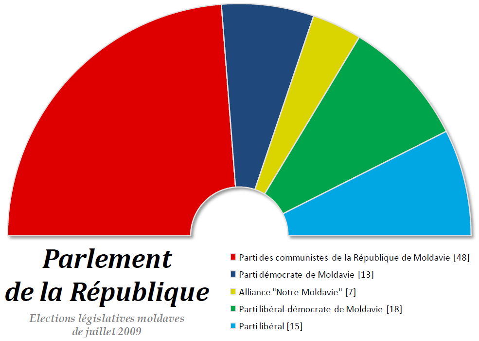 Composition politique du Parlement de la République de Moldavie à l'issue des élections législatives anticipées du 29 juillet 2009.